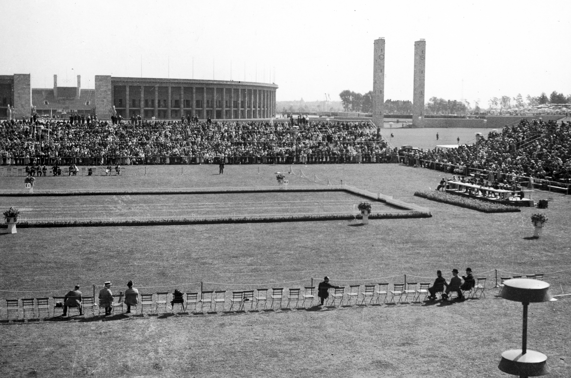 Maifeld az 1936. évi nyári olimpiai játékok díjlovagló versenyei alatt, háttérben az Olimpiai Stadion. Location: Germany, Berlin Tags: Berlin Olympics, Olympics, equestrian sports Title: Maifeld az 1936. évi nyári olimpiai játékok díjlovagló versenyei alatt, háttérben az Olimpiai Stadion.